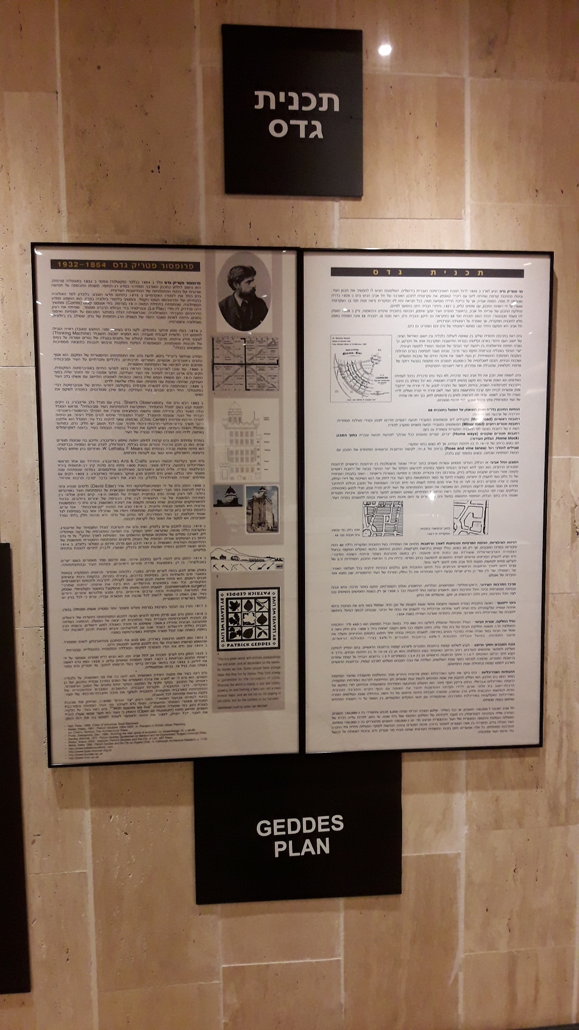 פטריק גדס